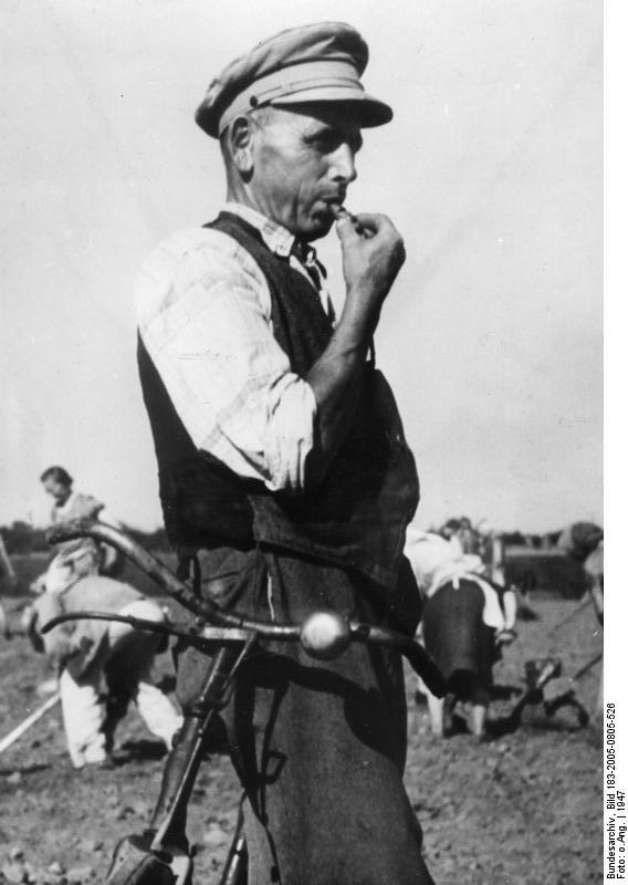 SBZ, Feldhüter bei Nachernte Nachernte 1947; SBZ "Wildes Stoppeln" gibt es nicht! Der Flurhüter sorgt für Ordnung. Die Felder dürfen nur in der Zeit von 8-12 und 14-20 Uhr betreten werden. Hier kündet der Feldwart die Sperrstunde mit seiner Trillerpfeife an. Illus/ADN 702-47 [Sowjetische Besatzungszone.- Feldhüter]